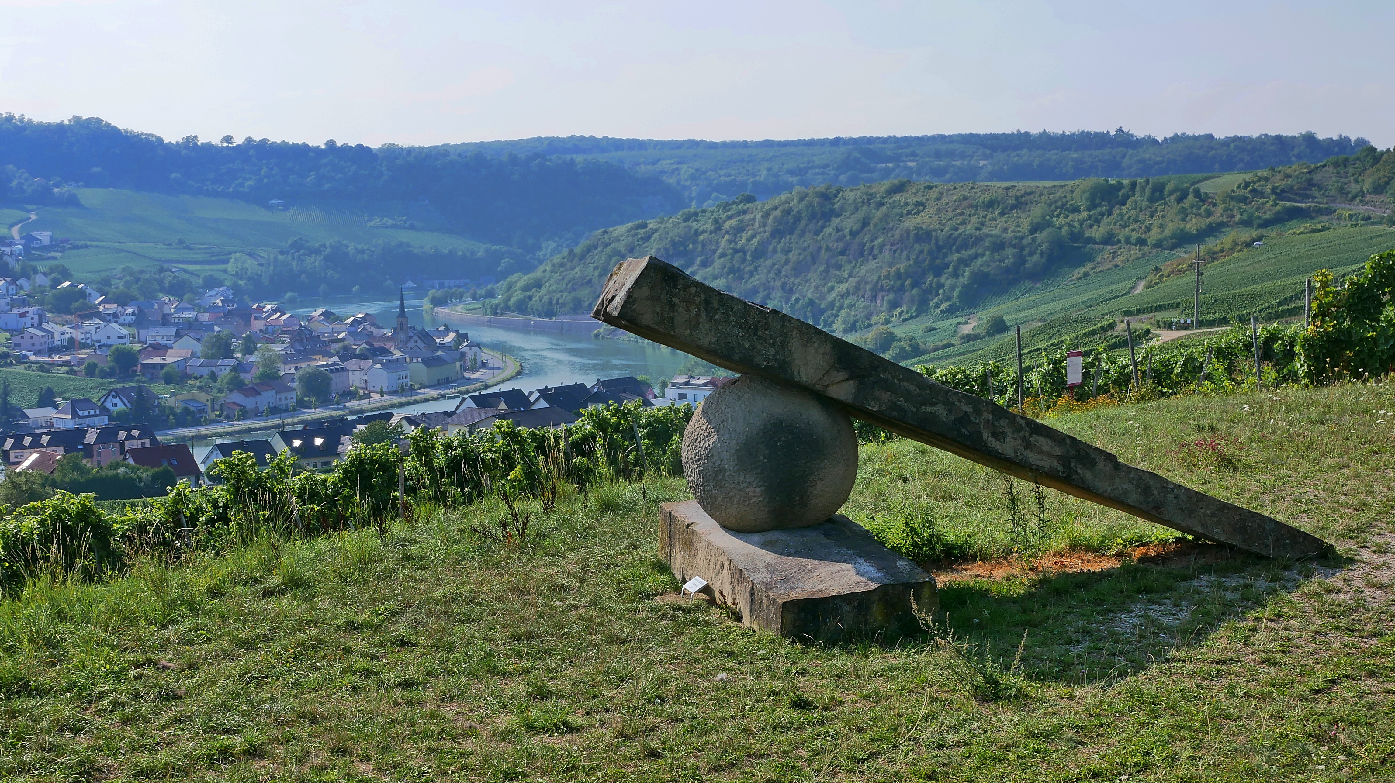 Hartwig Mülleitner; Knie mit Gelenk - Steine am Fluss. Die einzelnen Elemente dieses ehemals kompakten, bodenhaftenden Blocks erfahren in der Neukombination eine Umdeutung In den Weinbergen oberhalb von Nittel, in Sichtverbindung mit dem "Großen Zeiger" Jürgen Waxweilers, greift er das Motiv der Flussbiegung, des Knies, das die Mosel an dieser Stelle bildet, auf. Die zwischen die beiden langen Elemente geschobene Kugel fungiert als Gelenk, das eine Bewegung überhaupt erst möglich macht.